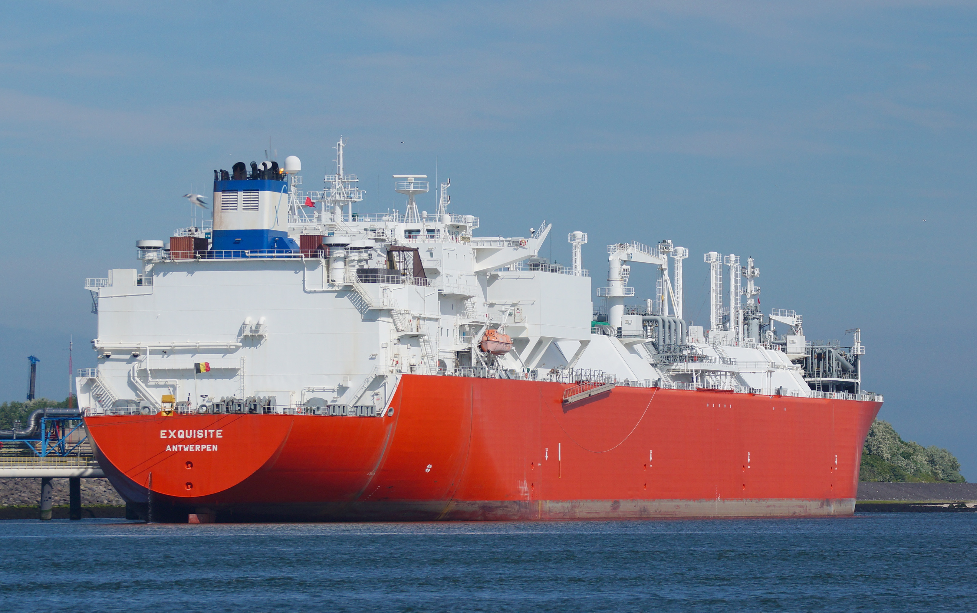 Europoort Nijlhaven 10-6-2014